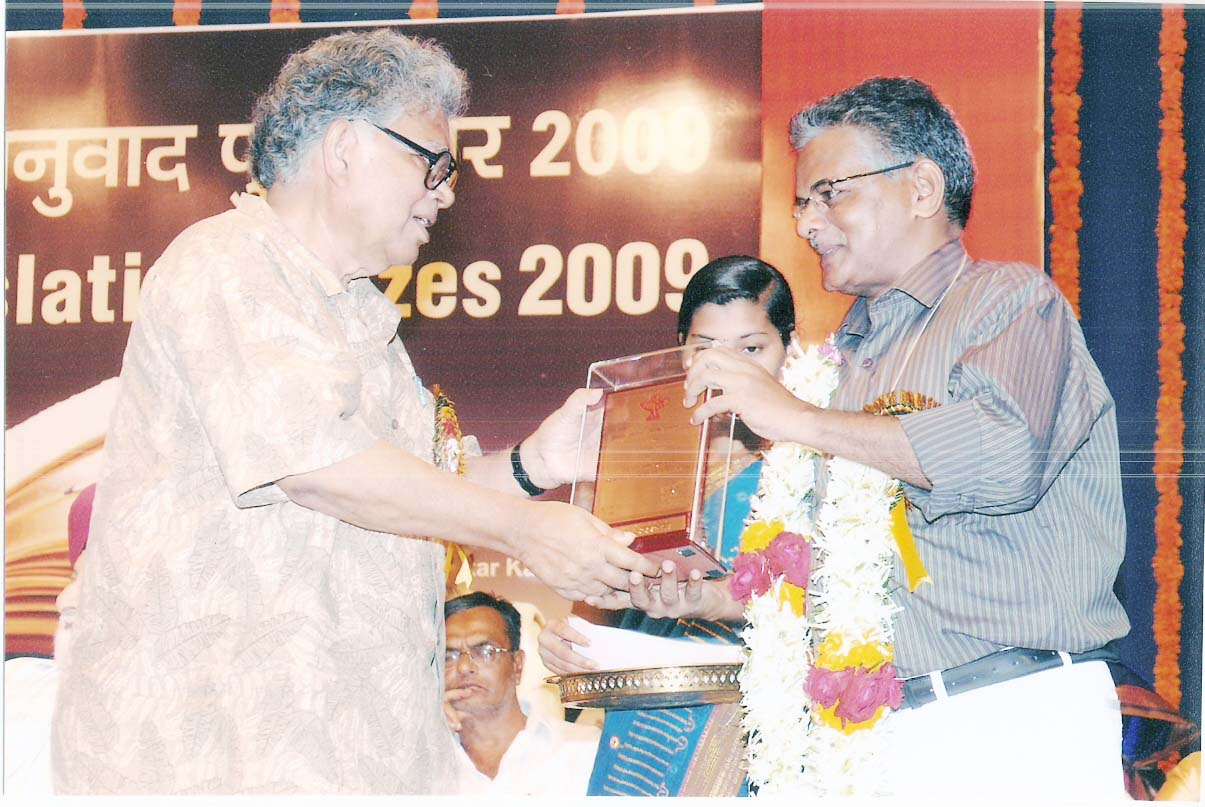 ప్రభాకర్ మందారకు సాహిత్య అకాడమీ పురస్కార ప్రదానం